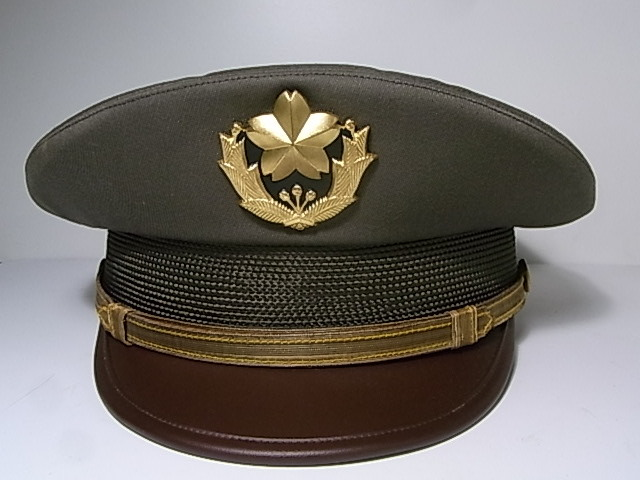 70式中期幹部正帽